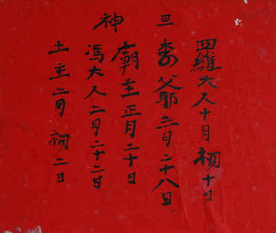 神旦